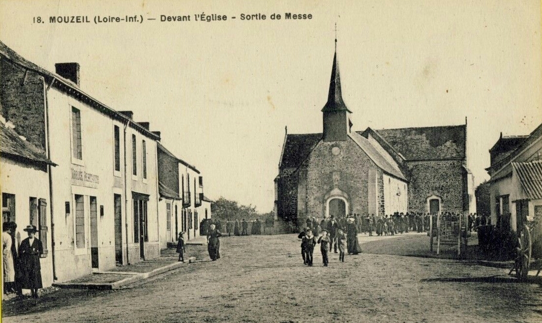 Sortie de la messe à Mouzeil vers 1912.